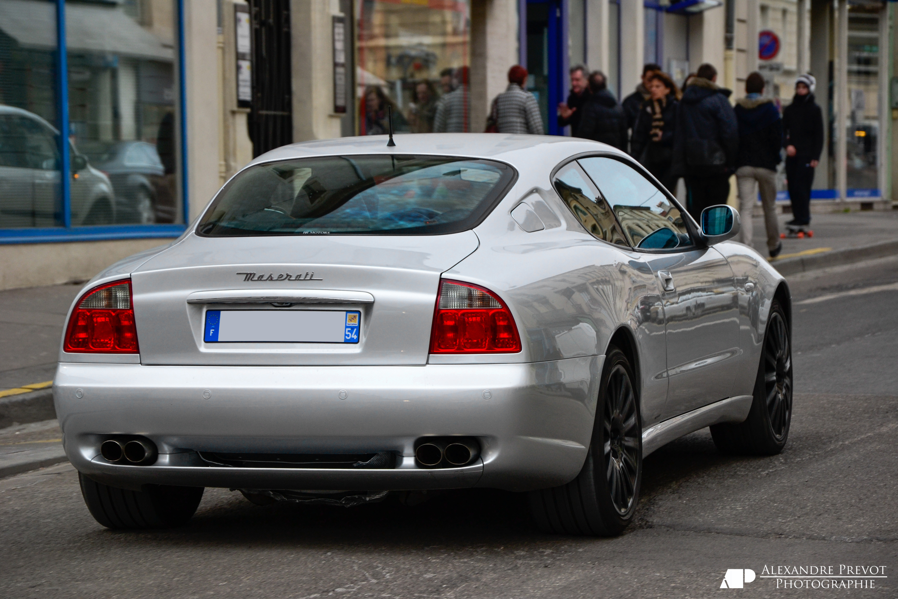 Una Maserati Coupé grigia